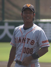 Giants_kobayashi_008